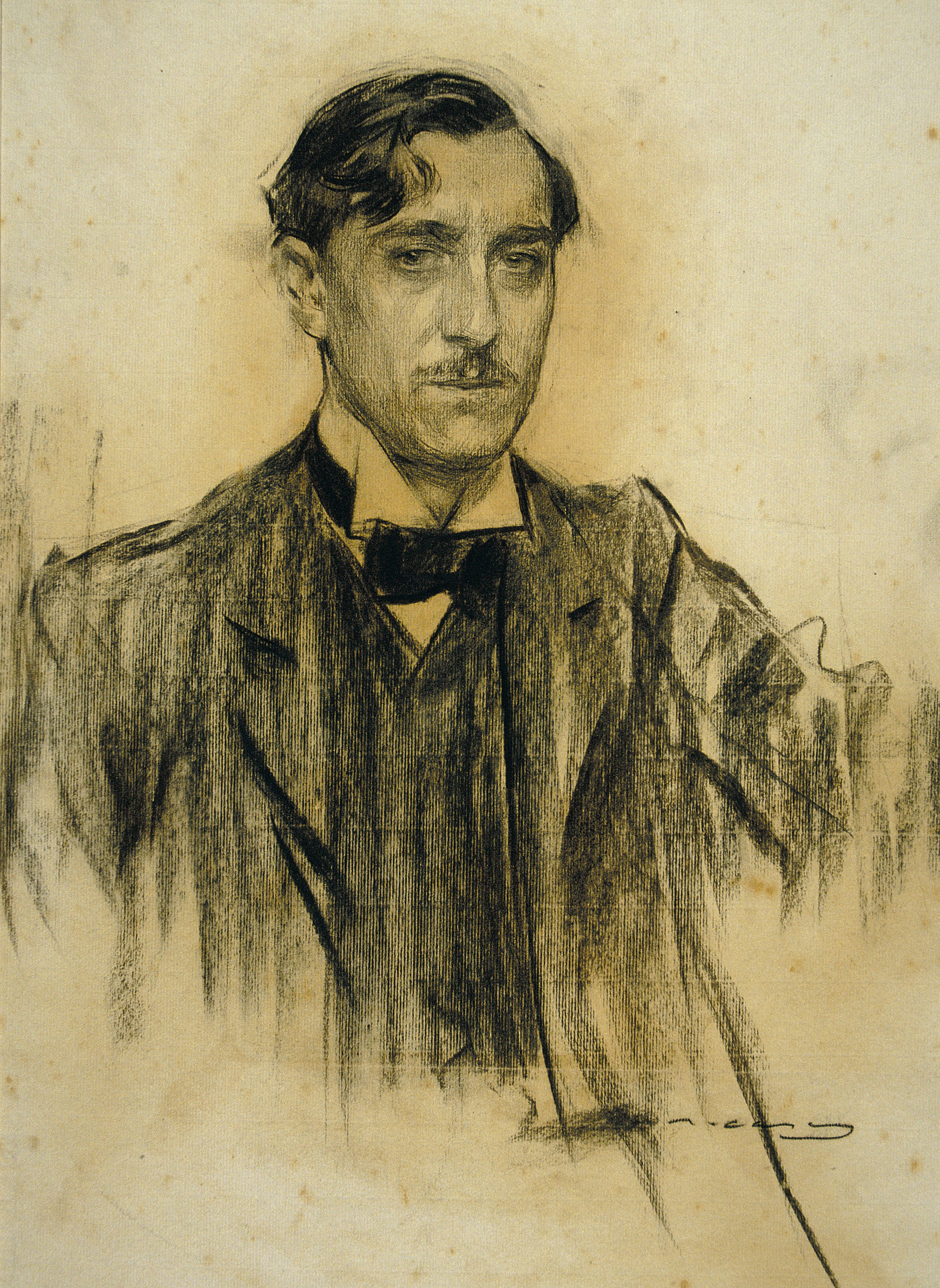 Ramiro de Maeztu, imagen.